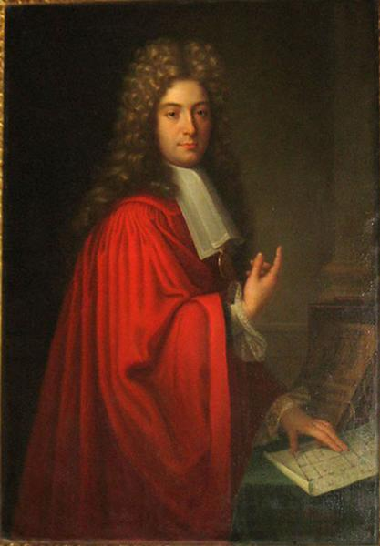 Portrait de Rallier du Baty, maire de Rennes de 1695 à 1734